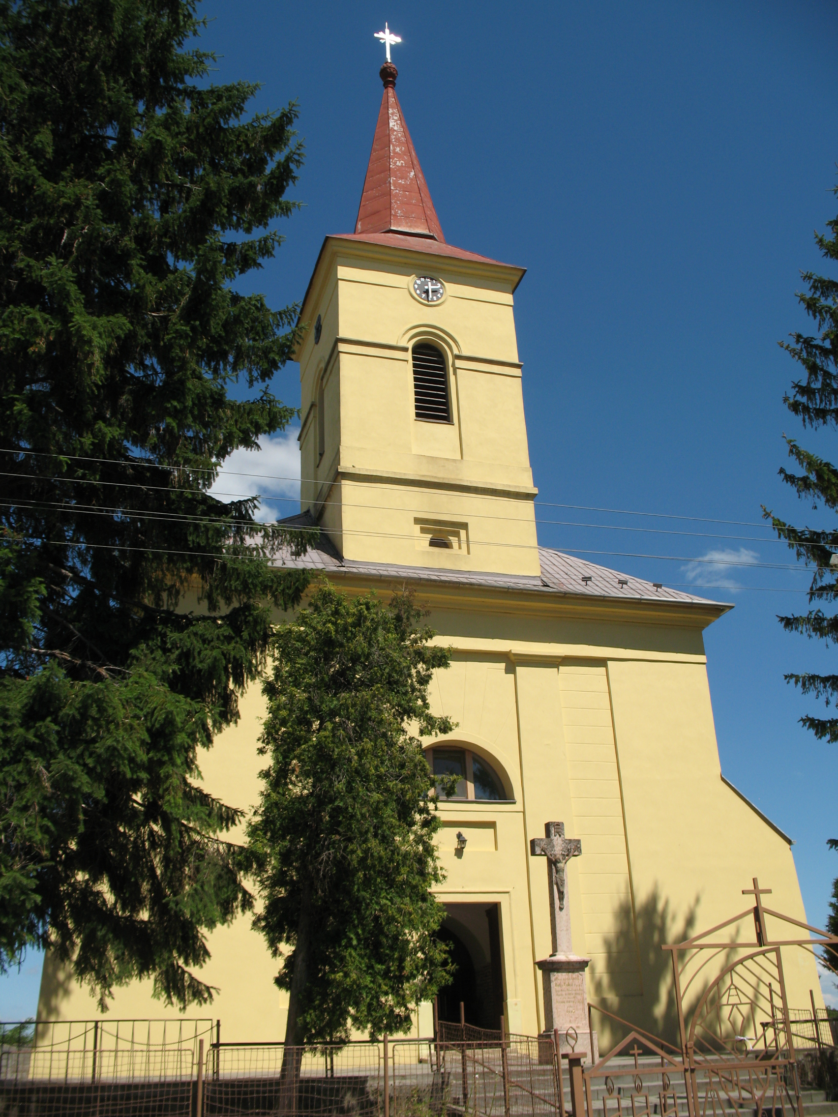 KöpösdSlovenčina: Kostol sv. Barbory